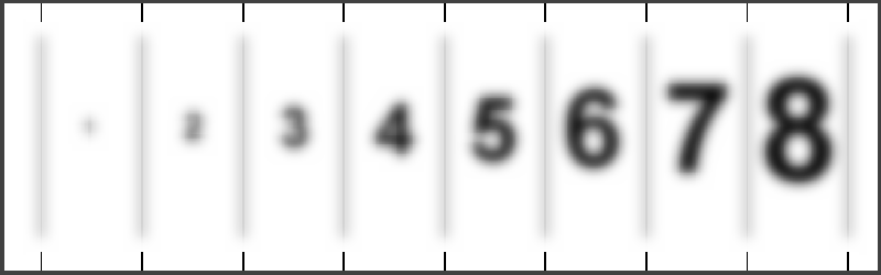 Historische Trübungsmessung